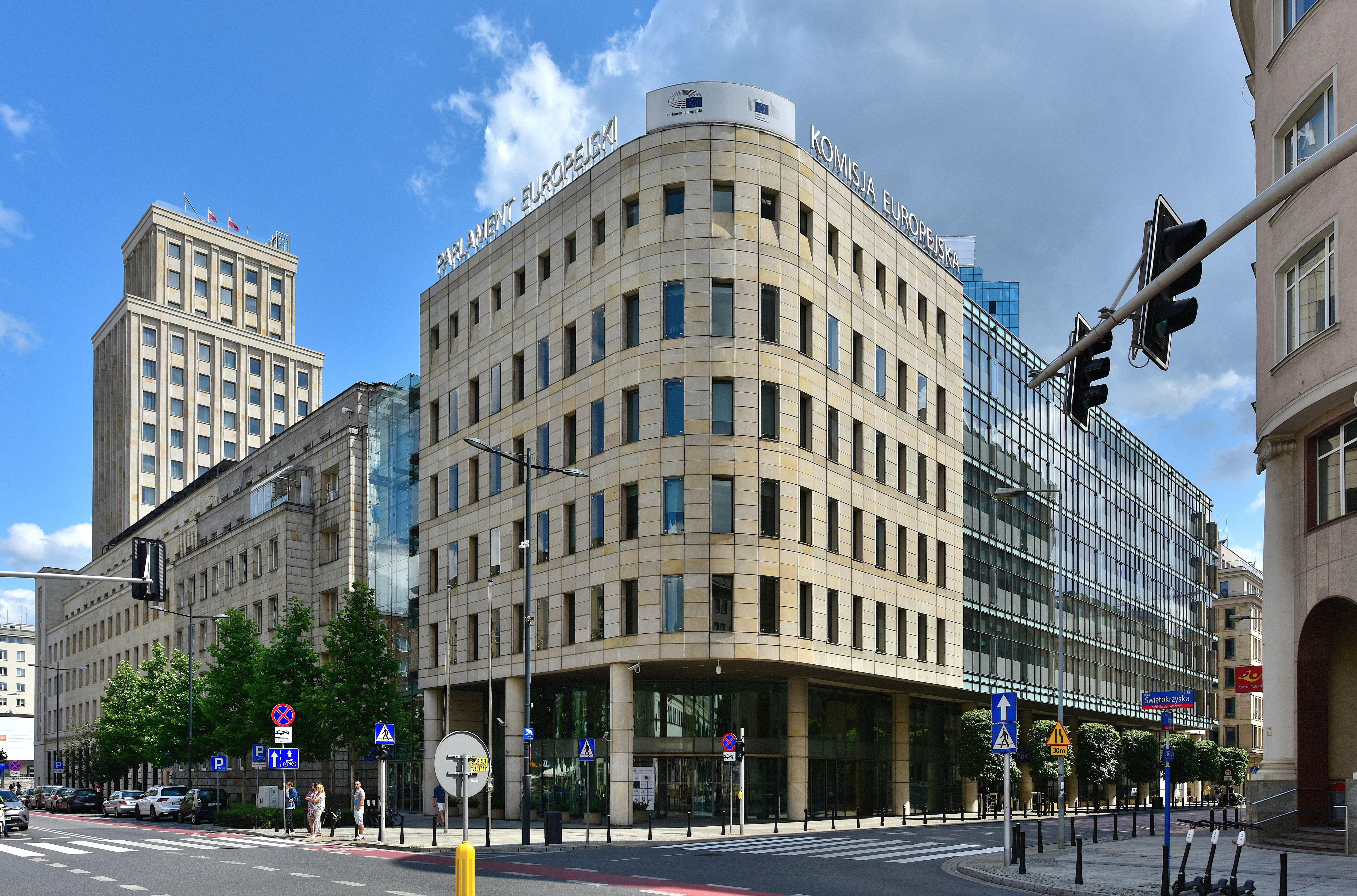 Biurowiec Centrum Jasna przy ul. Jasnej 14/16a w Warszawie